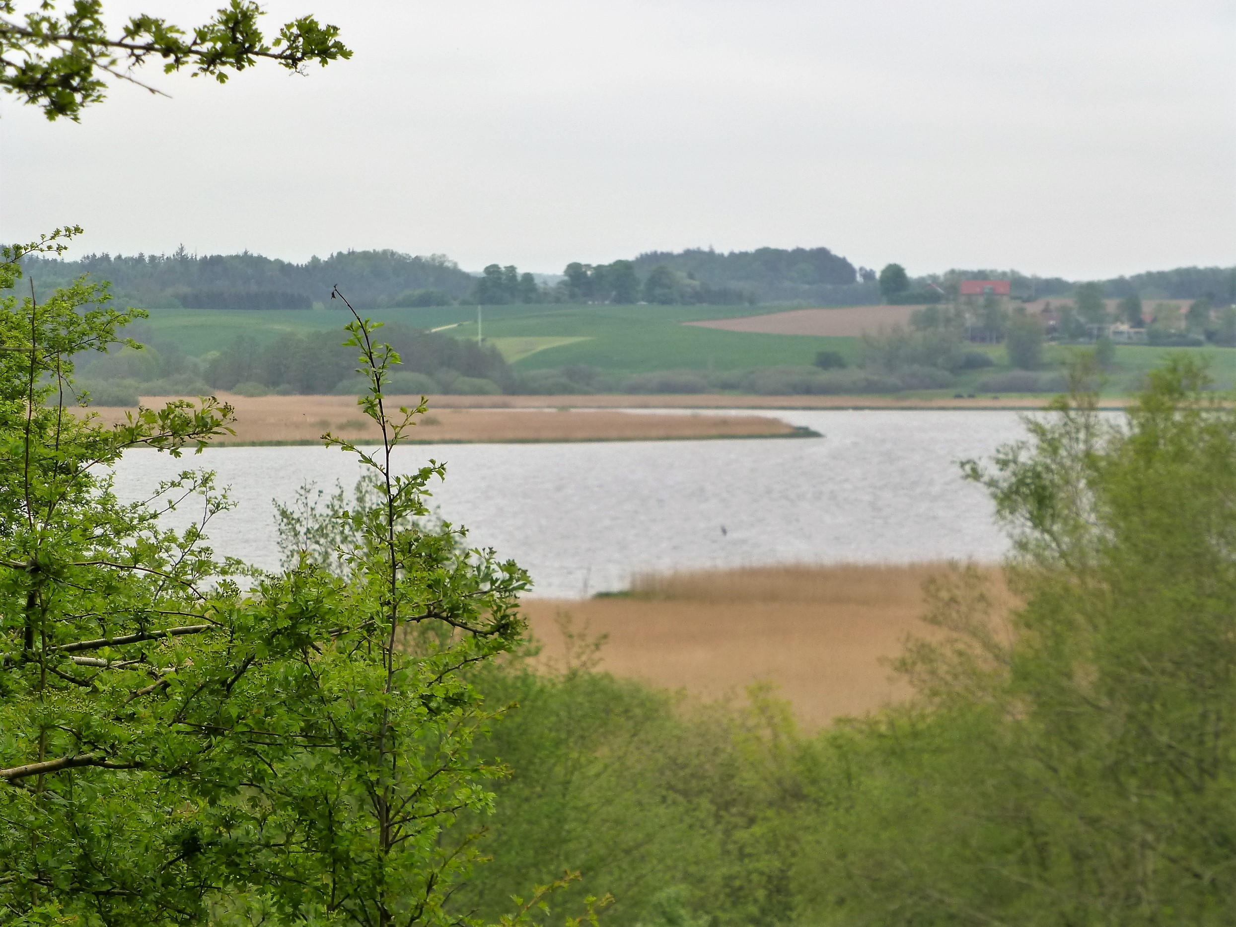 Nørrestrand ved Horsens set mod nordøst